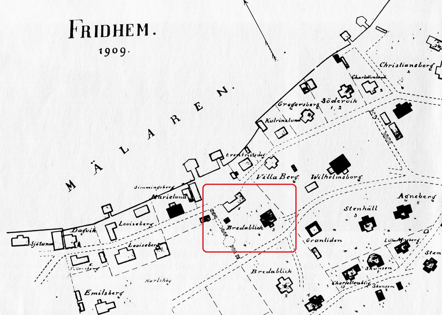 Del av Fridhem (dagens Mälarhöjden) år 1909, villa Bredablick i röd ram.